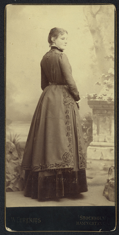 Kabinettsfotografi. Porträtt av kvinna iklädd reformdräkt. Kroppen sedd snett bakifrån, ansiktet i halvprofil. Ateljébild.